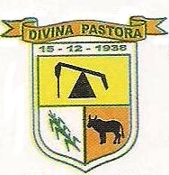 Brasão do município de Divina Pastora